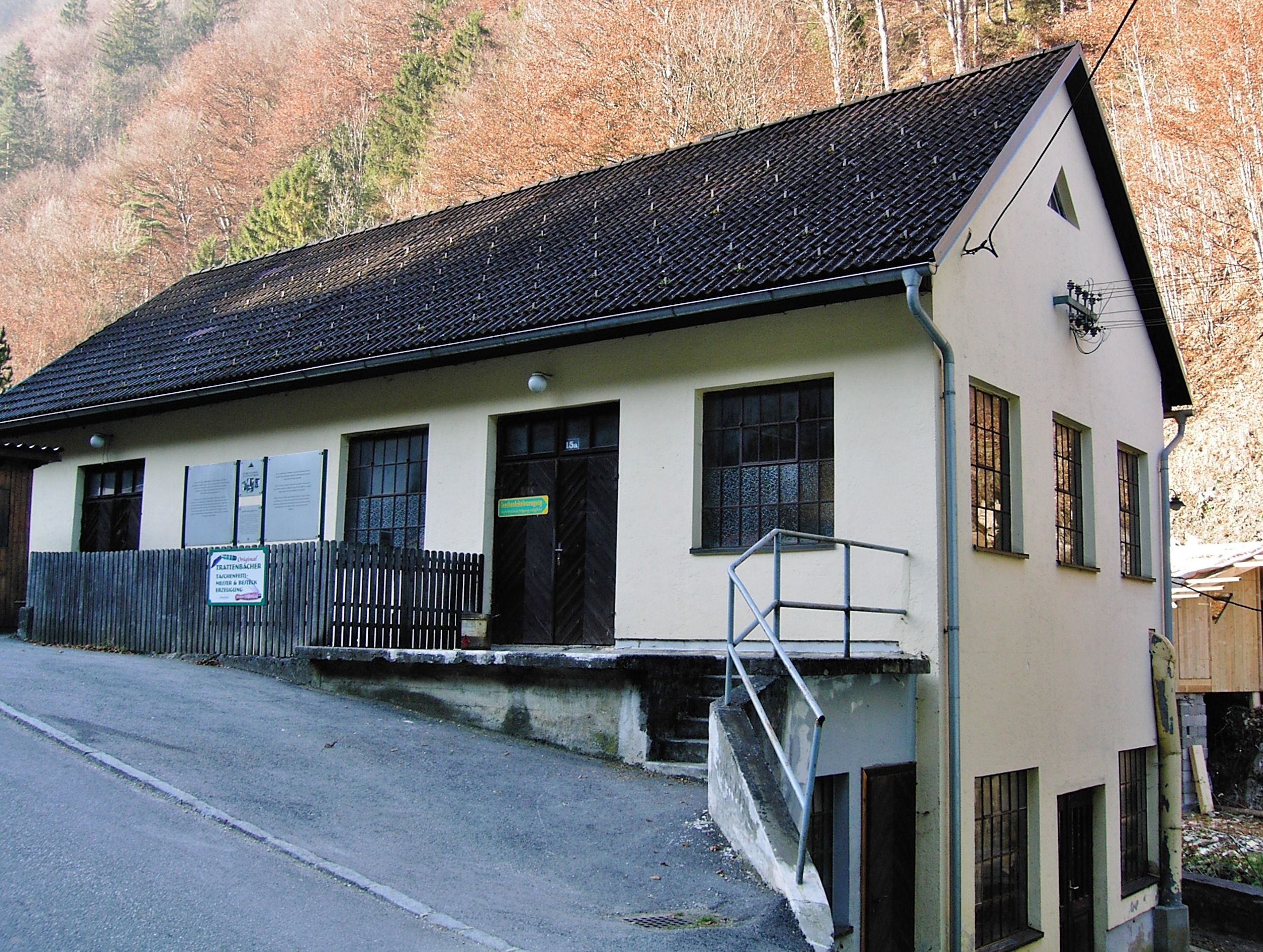 Ternberg Feitelwerkstätte der Feitelerzeugung Löschenkohl, Hammerstraße, ansicht von Hammerstraße aus